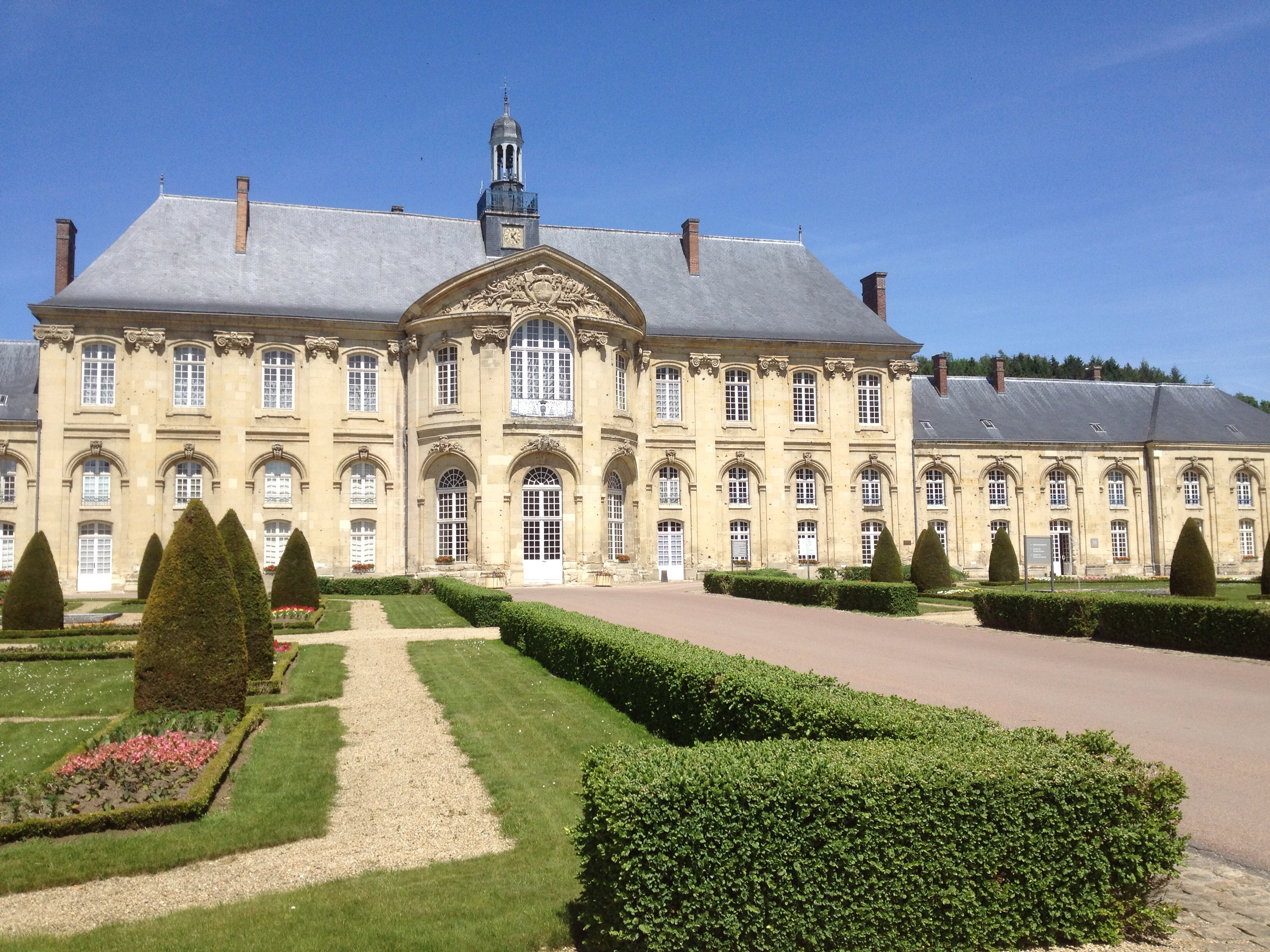 Bâtiment principal de l'abbaye de Prémontré (Aisne, Picardie)